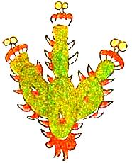 Soconusco (Xoconochco) Glifo azteca